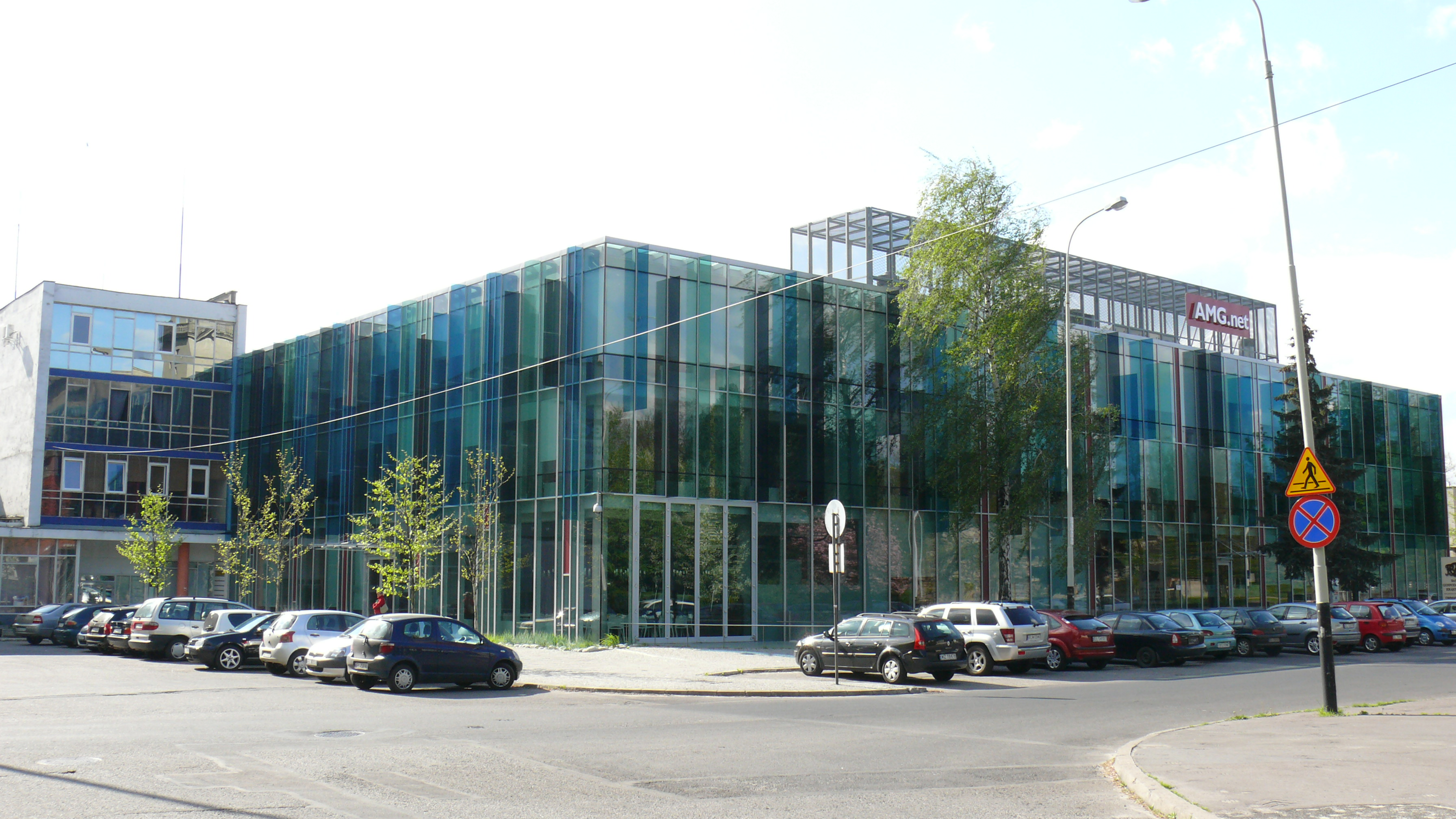 Lumiere Center w Łodzi